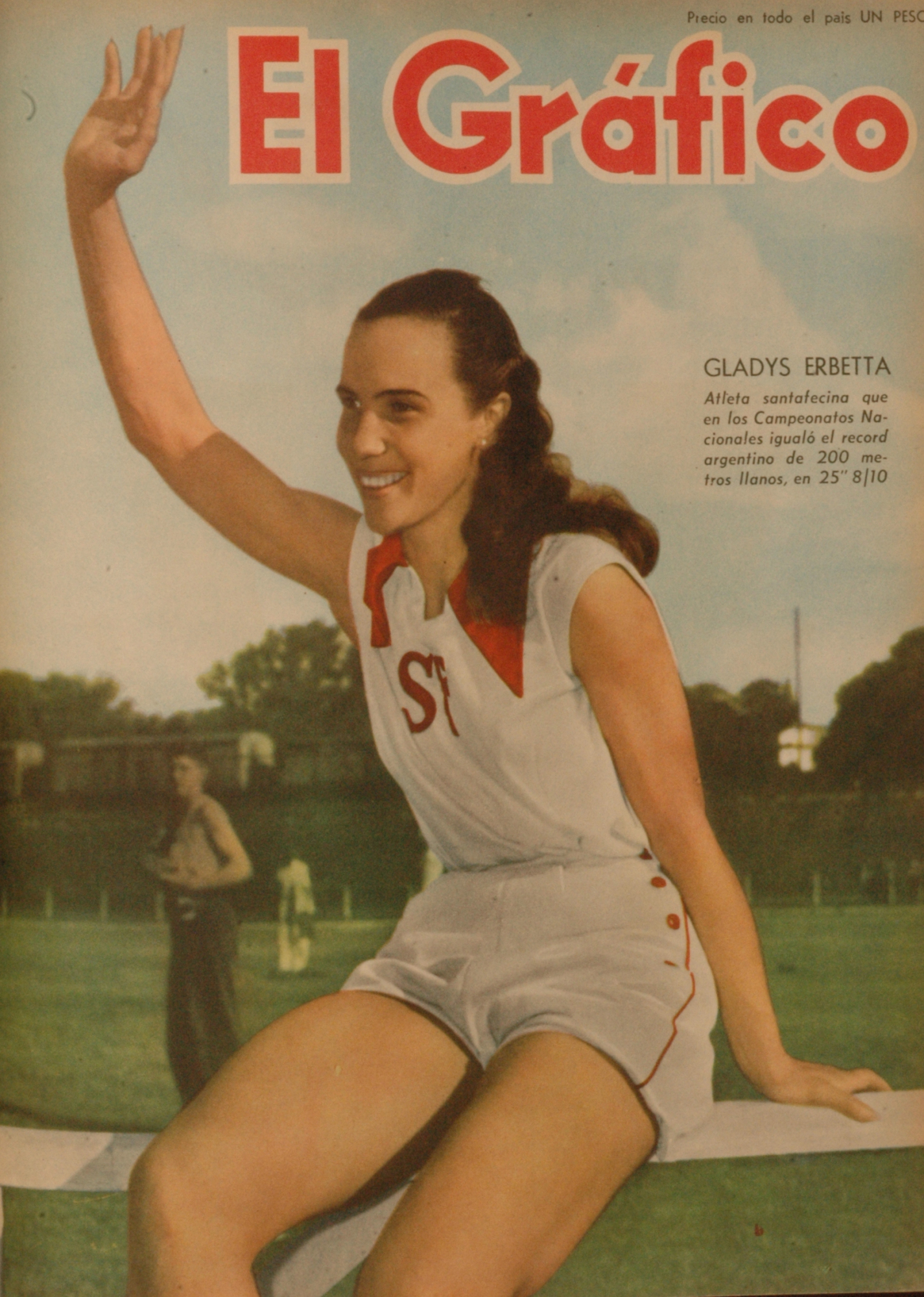 El Grafico del 18 de Enero de 1952. Edicion 1693